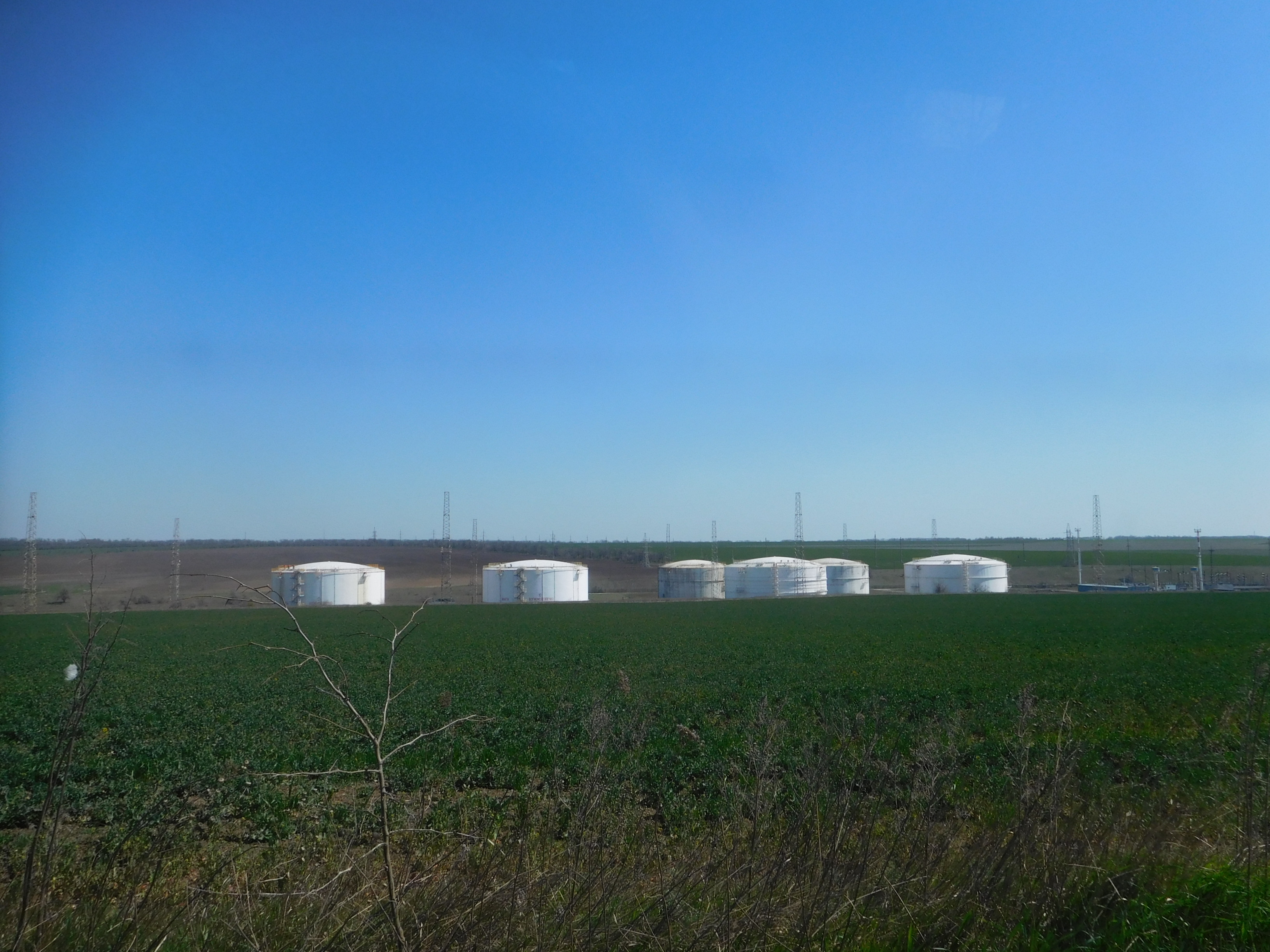 с. Протопопівка, Міжлимання, Одеська область